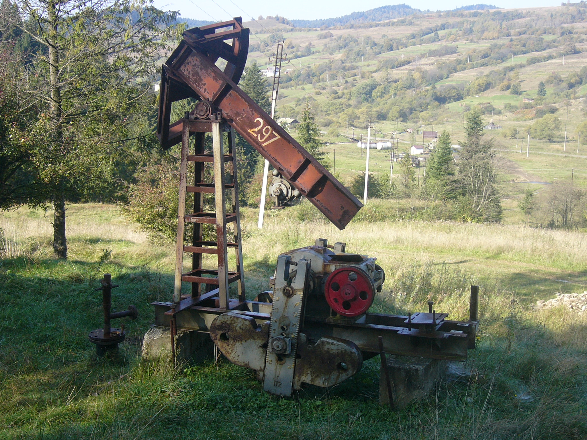 Закинута_качалка